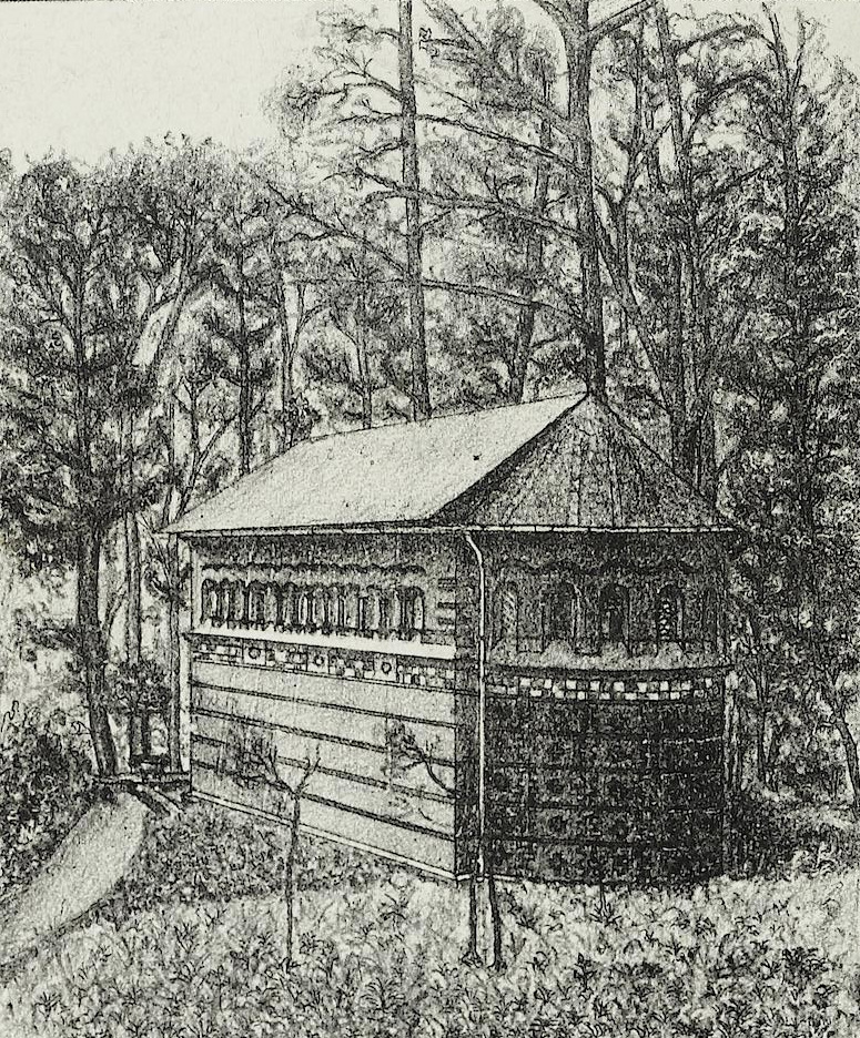 Inneres der Sarolta-Kapelle in Fränkisch-Crumbach, Untergeschoss: Gruft für Sarolta Batthyány von Németh-Ujvár († 1892). Zeichnung entstanden zwischen Einweihung des Mausoleums 1892 und Veröffentlichung der Stocker-Chronik 1895. Reprod. in Carl Wilhelm Friedrich Ludwig Stocker: Familien-Chronik der Freiherrn von Gemmingen, Heidelberg 1895, Bildtafel zw. S. 296 und 297.